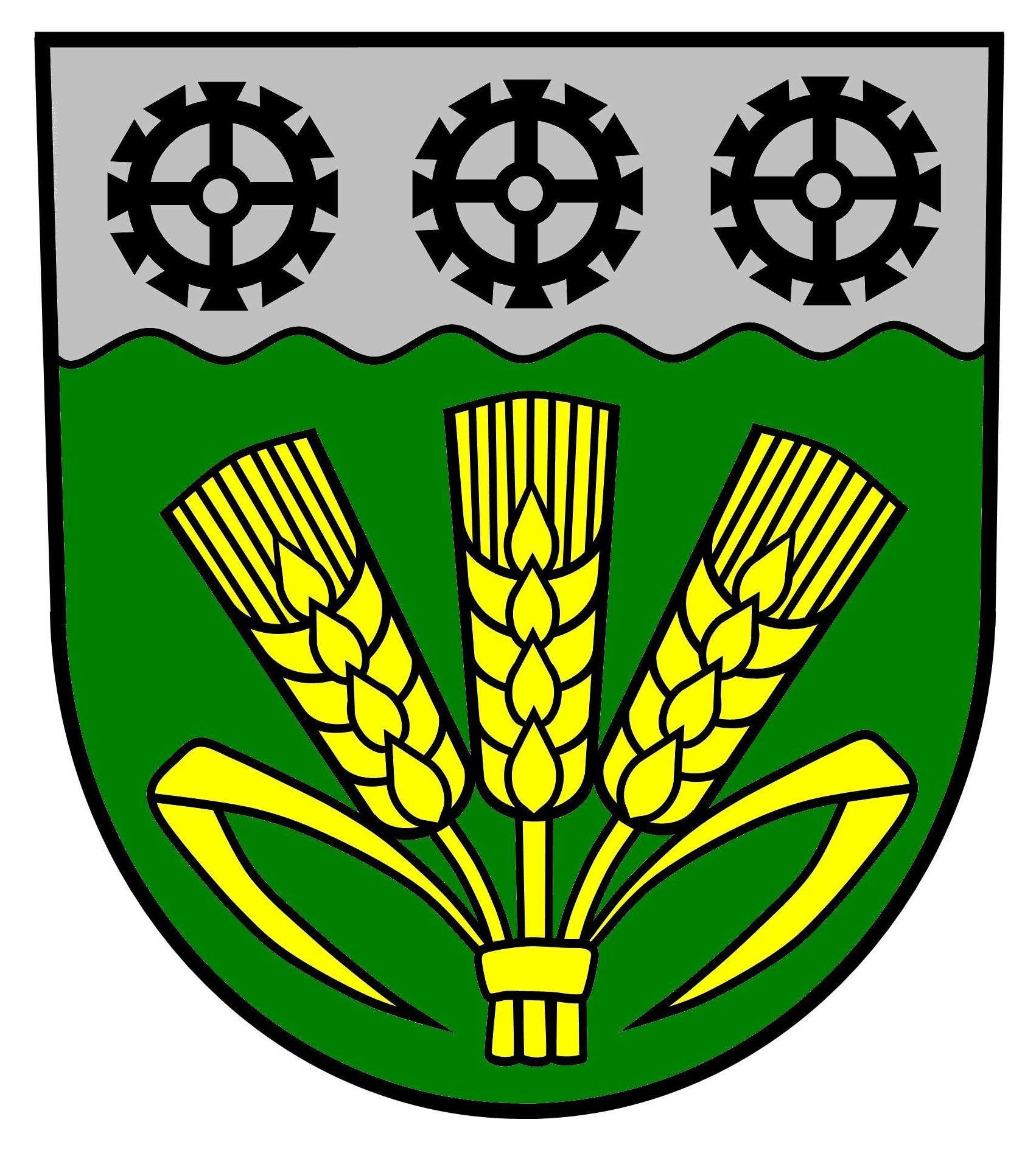 Wappen der Gemeinde Elstertrebnitz